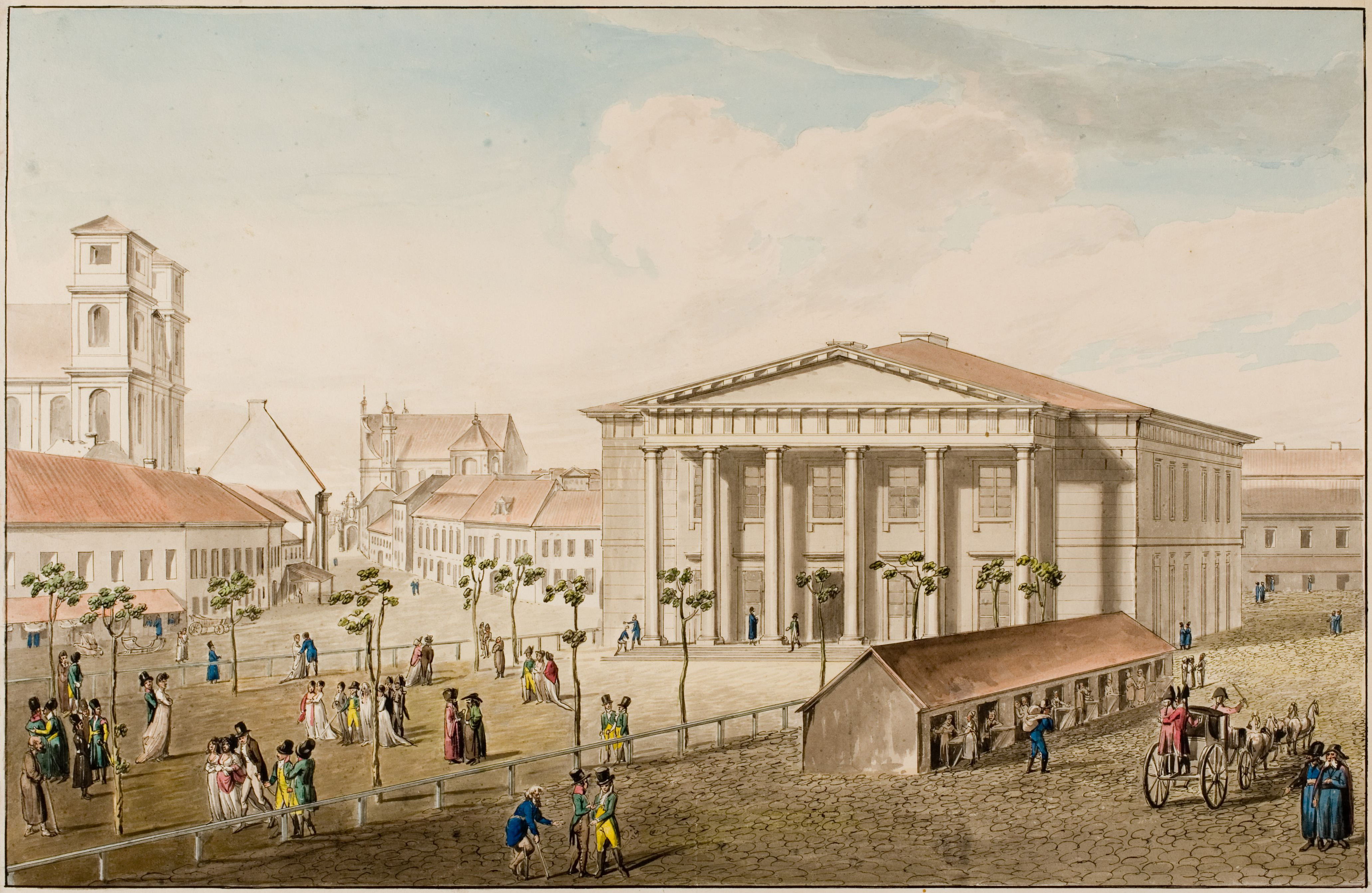 Беларуская (тарашкевіца): Віленская ратуша